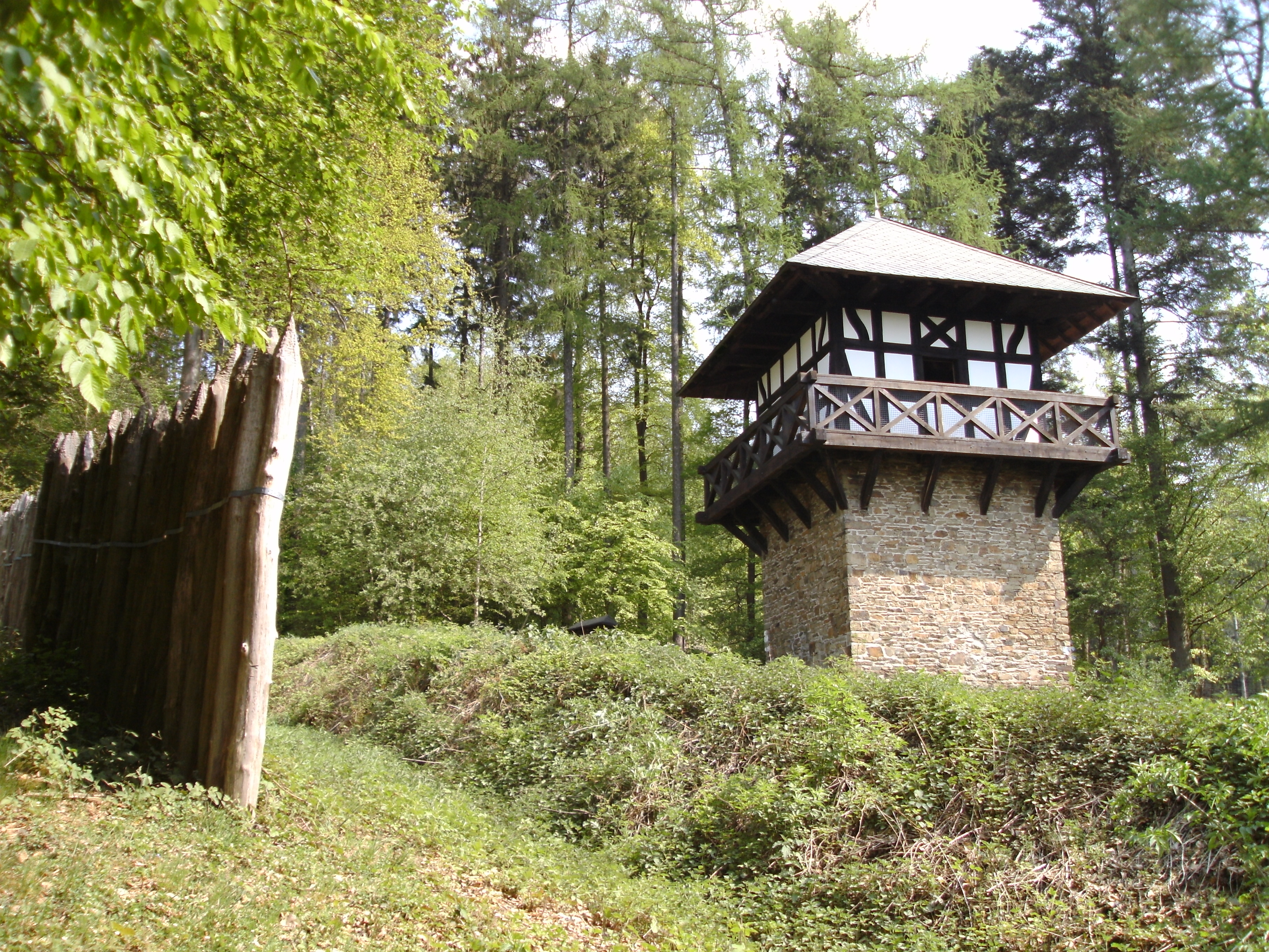 Rund 37 m hinter dem Limesgraben liegt der stark erodierte Schutthügel des Steinturms Wp 1/54 „Auf dem Pulverberg“. Eine 1912 errichtete, teilweise fehlerhafte Rekonstruktion (Fachwerk) befindet sich etwa 10 m östlich der originalen Turmstelle. Sie wurde in den Jahren 2009/2010 aufwendig restaurierte und steht unter Denkmalschutz.